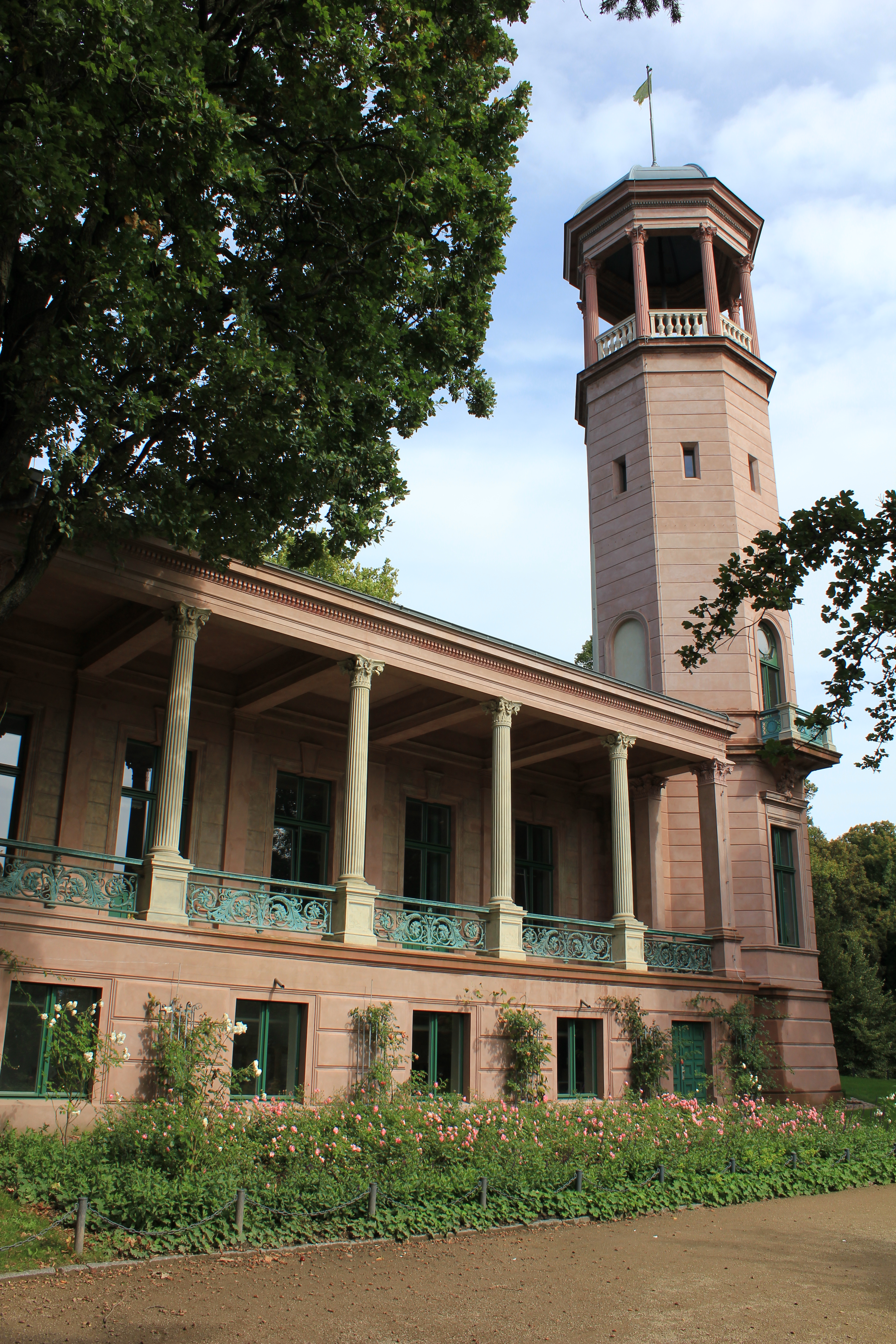 Ansicht vom Schloss